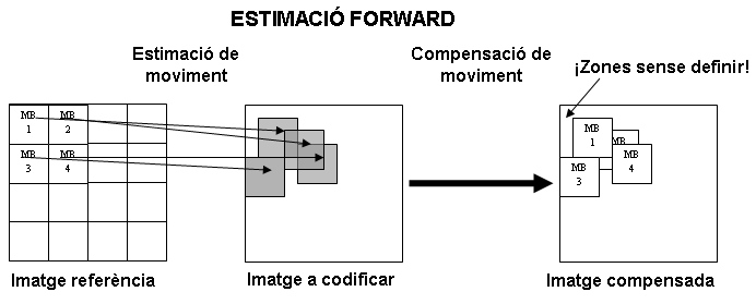 Esquema per entendre millor el concepte